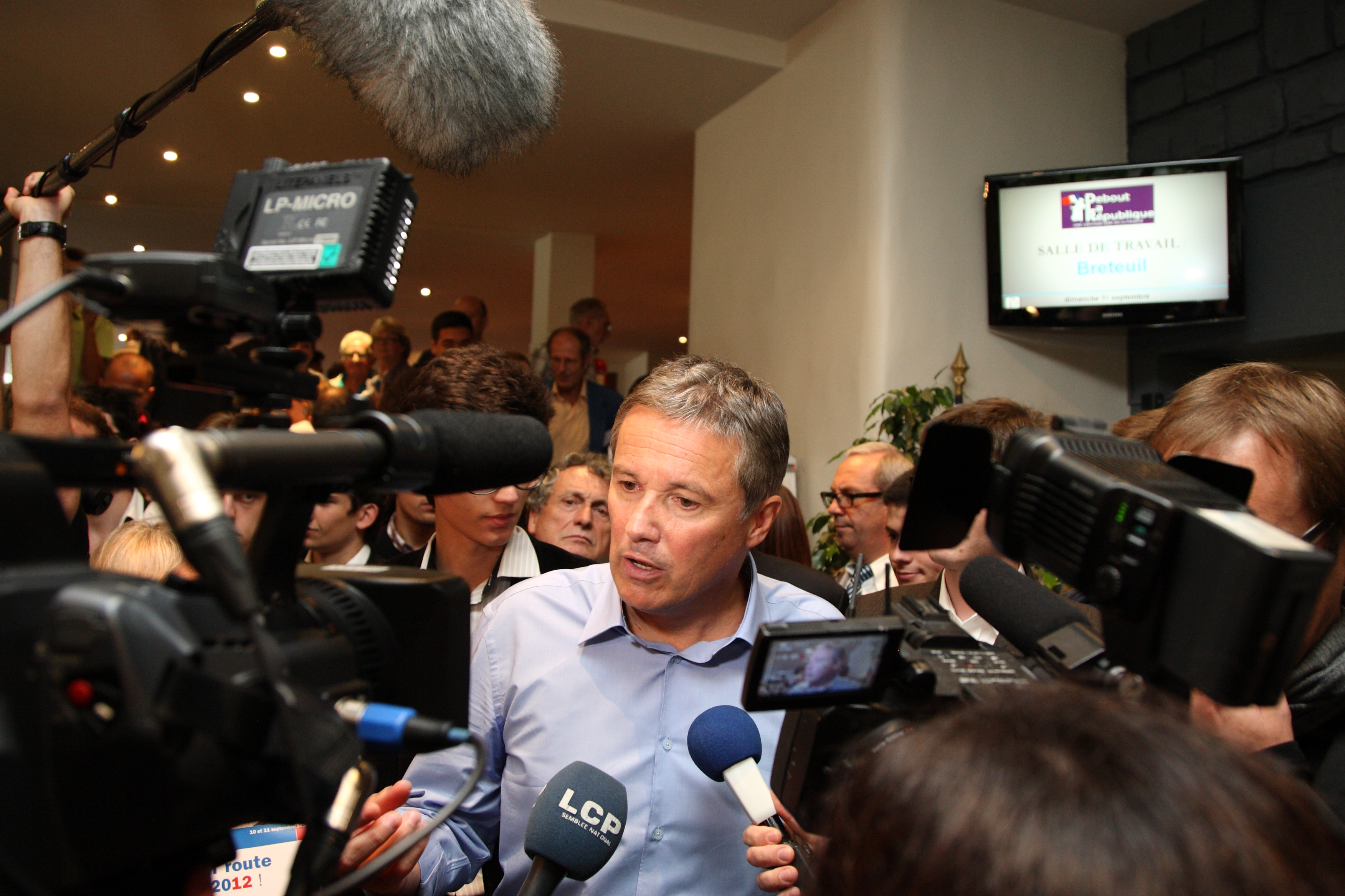 Nicolas Dupont Aignan lors des universités de rentrée de DLR 2011